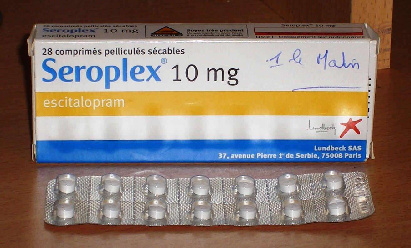 boite d'escitalopram